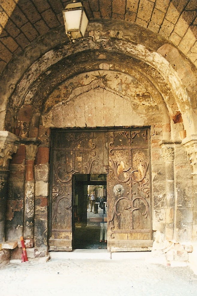 St.-Julien Brioude, Portal in SW-Vorhalle